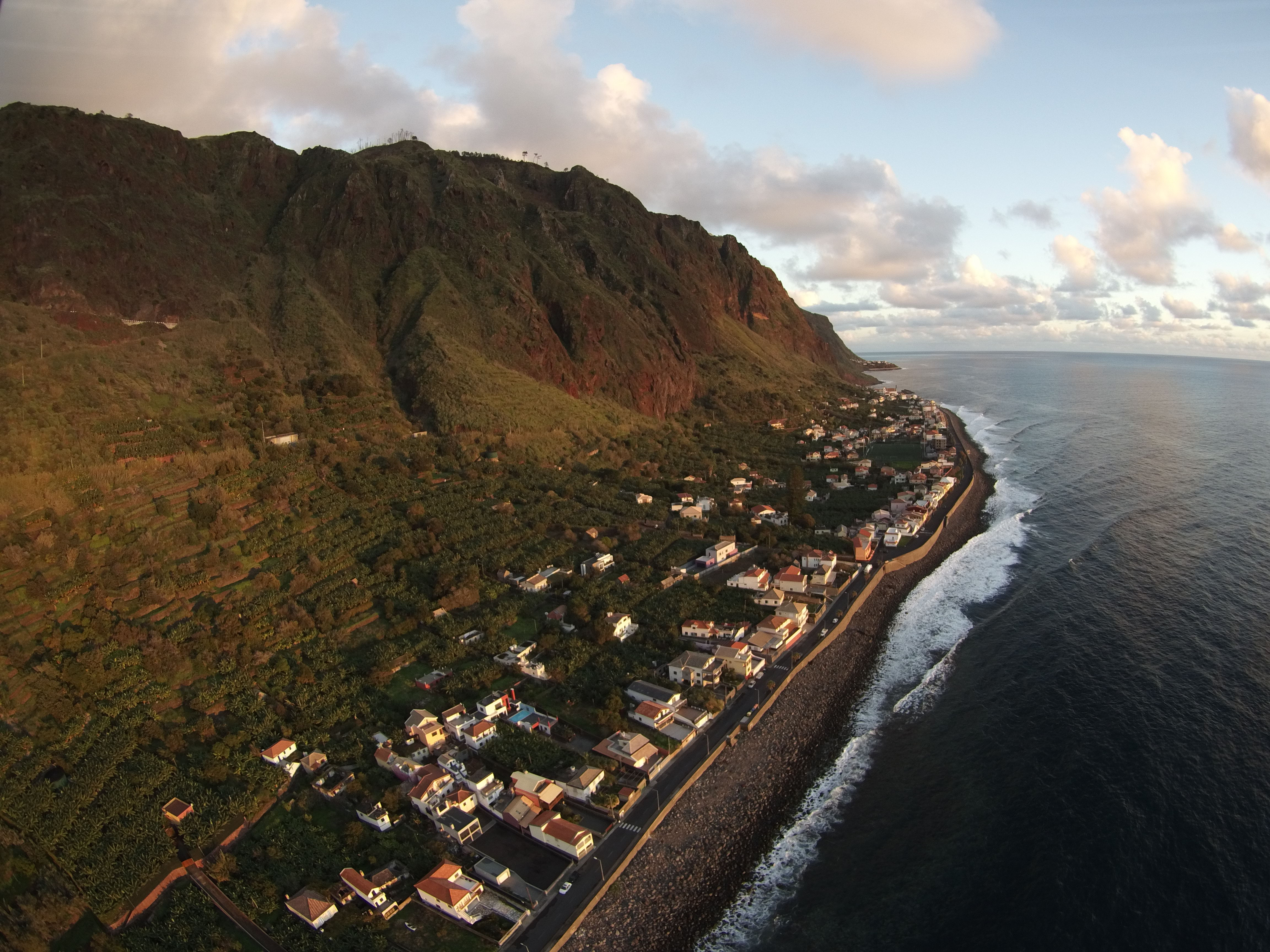 Dieses Luftbild zeigt die Gemeinde Paul do Mar auf der Insel Madeira.